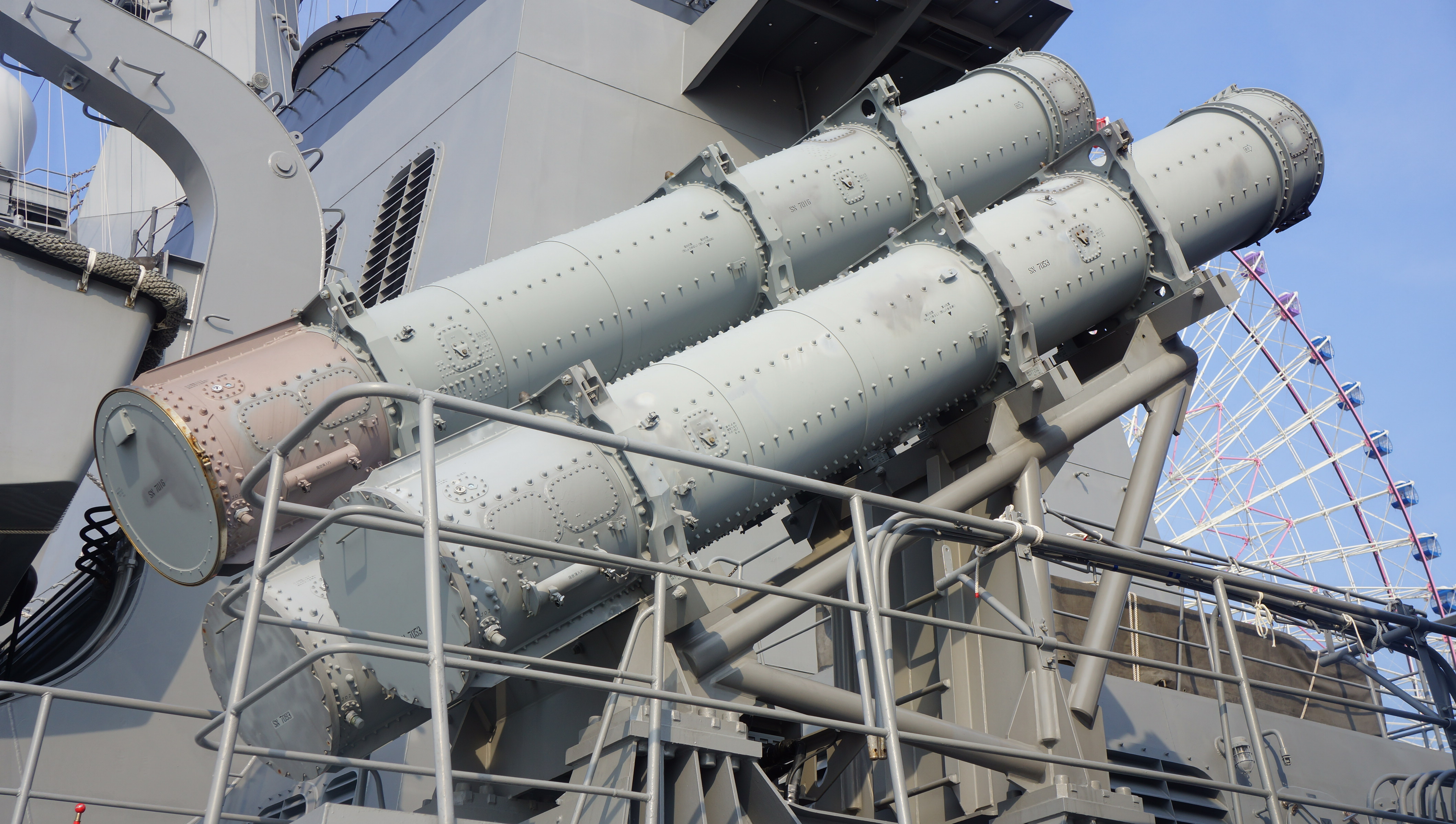 海上自衛隊 護衛艦あたご（DDG-177） 90式空対艦誘導弾（SSM-1B）発射筒。 14年4月26日 天保山埠頭にて。